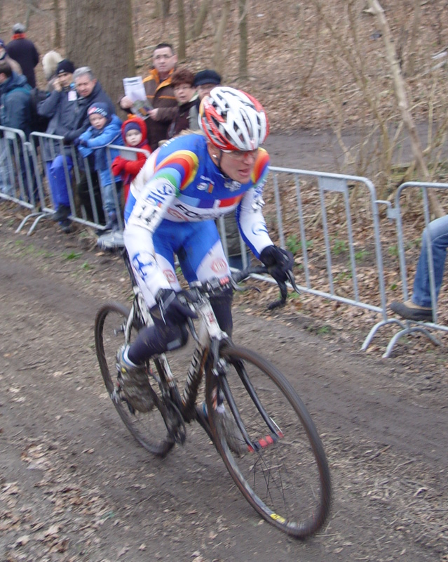 Hanka Kupfernagel op de WB manche van Hoogerheiden op 21 jan 2007